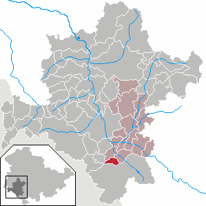 Wölfershausen in Thuringia - District Schmalkalden-Meiningen